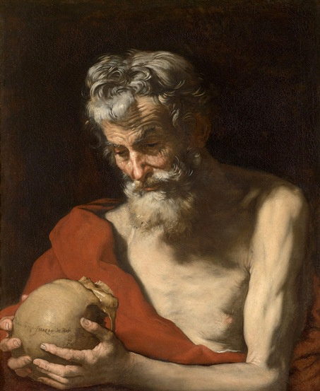 Saint Jérômelabel QS:Lfr,"Saint Jérôme"